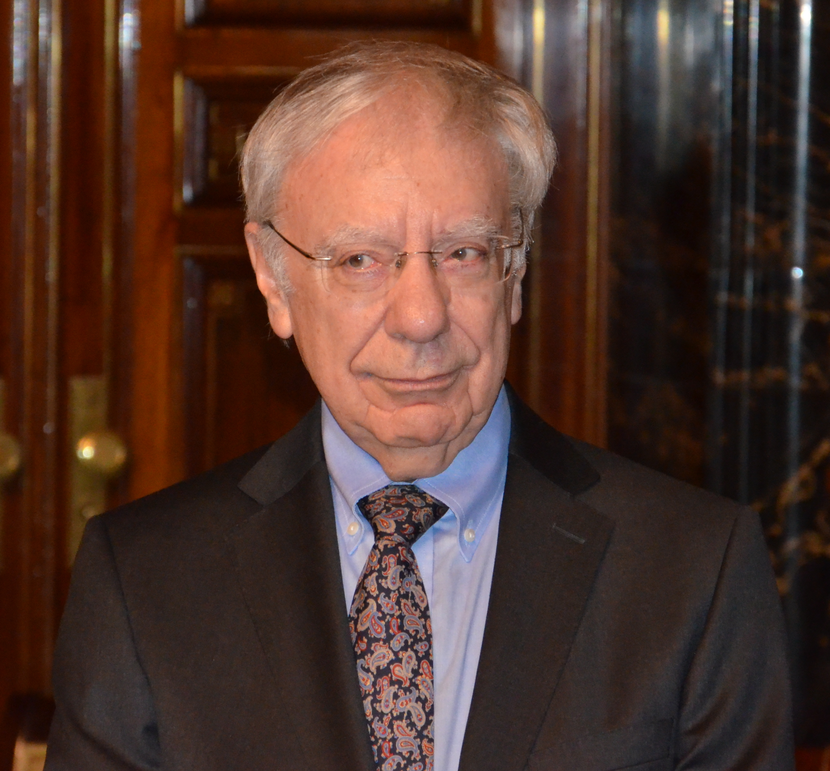 Roland Issen beim Senatsempfang im Hamburger Rathaus zu seinem 80. Geburtstag